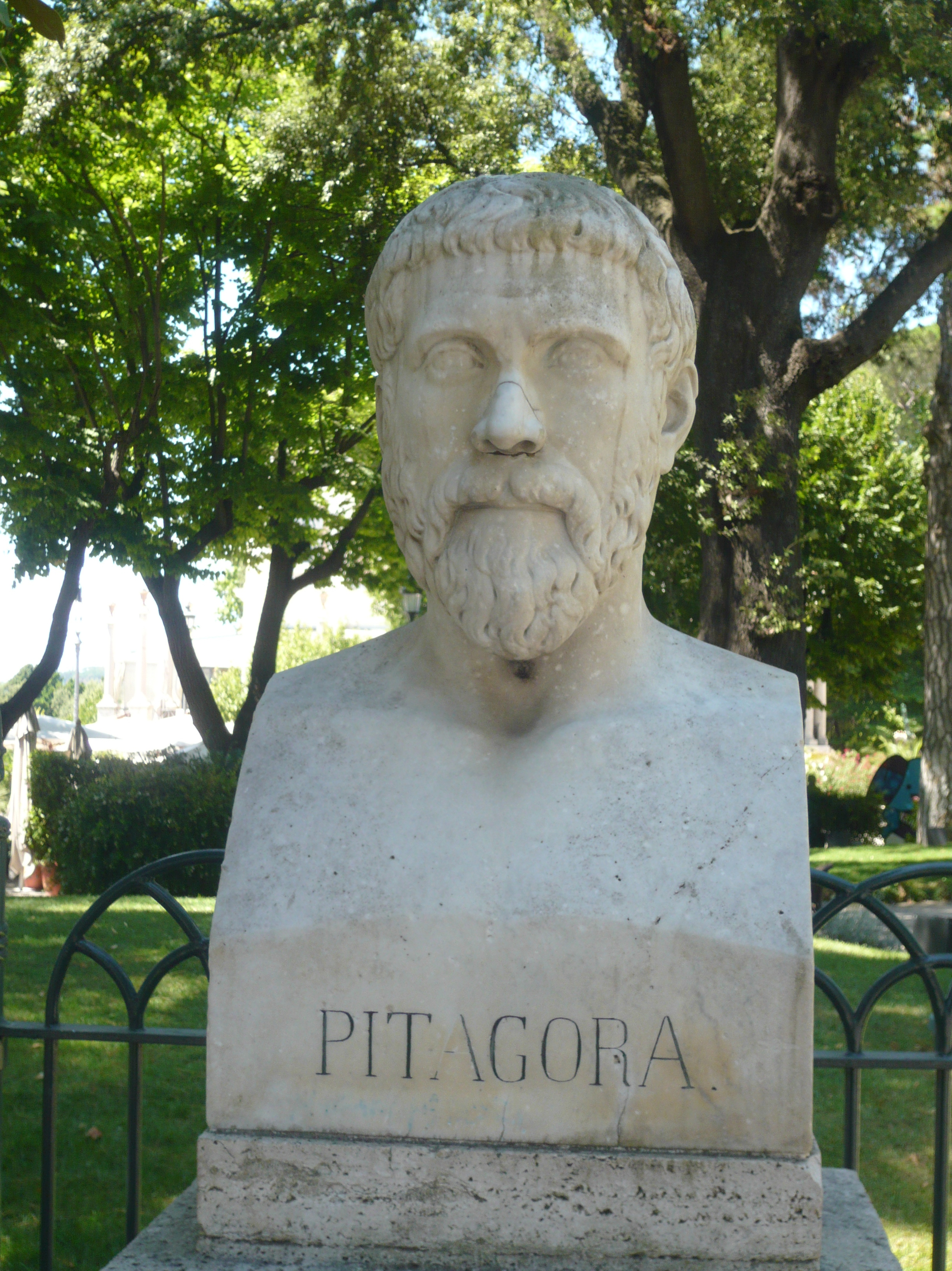 Buste de Pitagore (parc pincio)